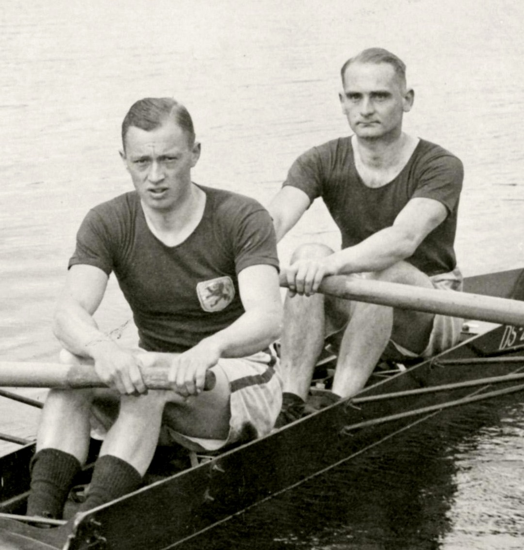 Sport, Olympische Spelen Amsterdam, Nederland, 1928: Roeien. De Nederlanders Hein van Suylekom (slag) en Carel van Wankum (boeg) werden 6e op het onderdeel twee zonder stuurman.